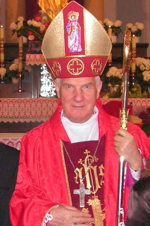 Biskup Ignacy Dec